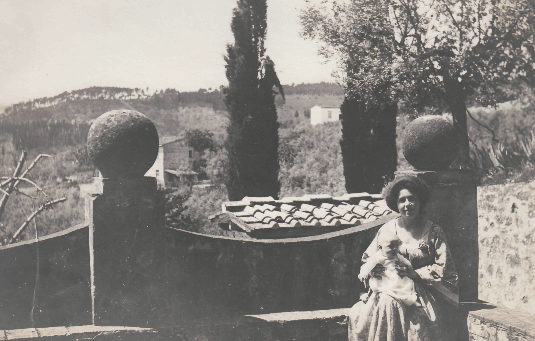 Ilse Kiessling und Benvenuto Kiessling in Fiesole